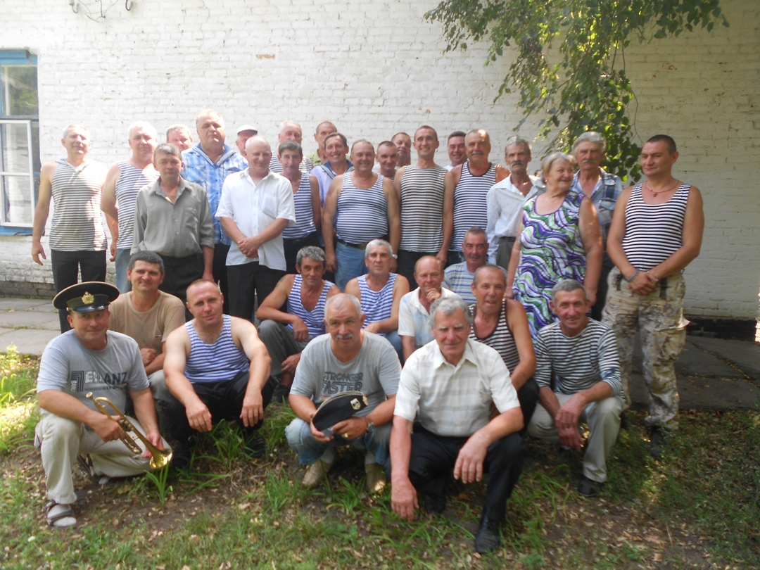 День моряка 2015